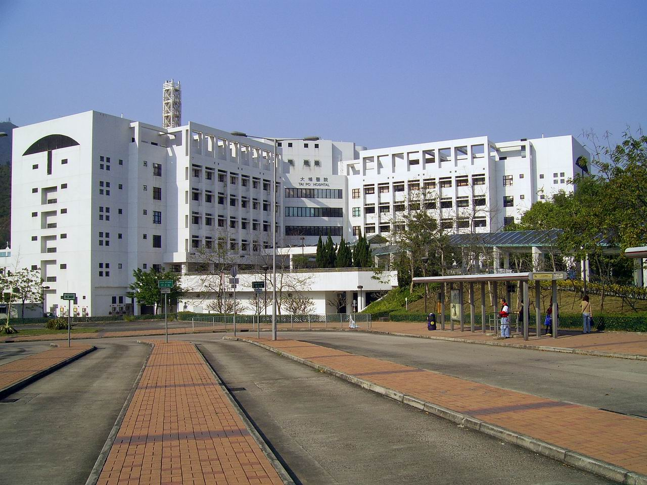 大埔醫院